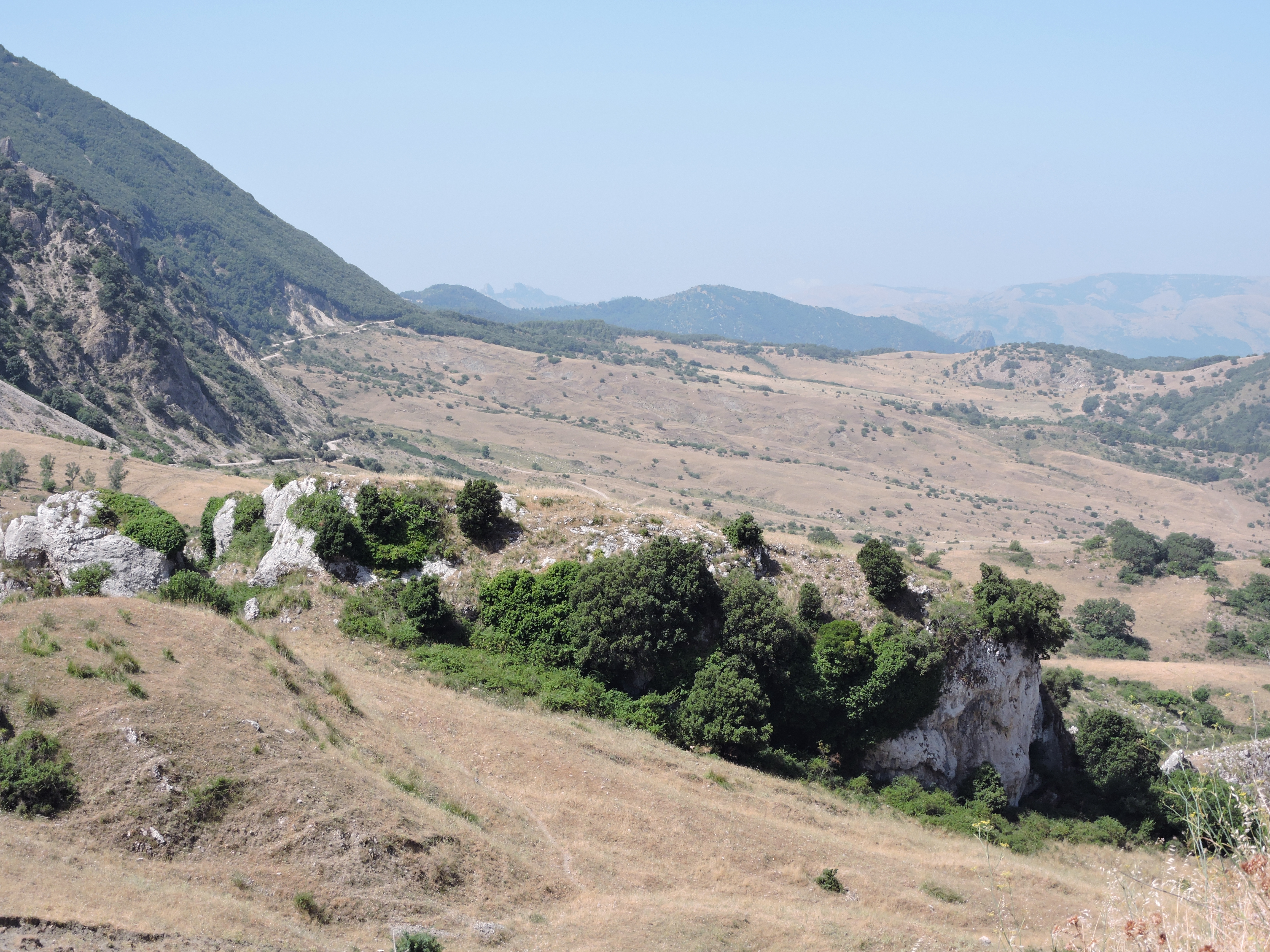 Pietra Salamone, accessibile da uno dei tanti sentieri della Riserva Orientata Naturale Monti di Palazzo Adriano e Valle del Sosio This is a photo of a monument which is part of cultural heritage of Italy.